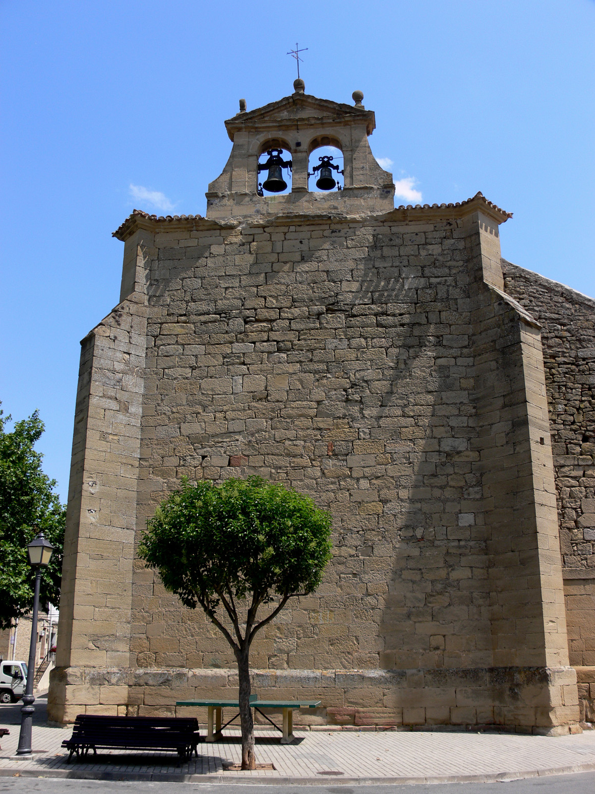 Iglesia de Santa Margarita en El Cortijo, Logroño (La Rioja - España).